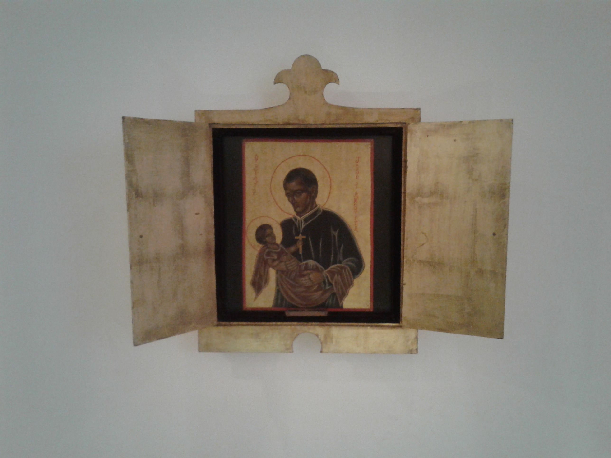 Foto do relicário de José de Anchieta tomada durante visitação do túmulo simbólico no Palácio Anchieta em Vitória-ES.